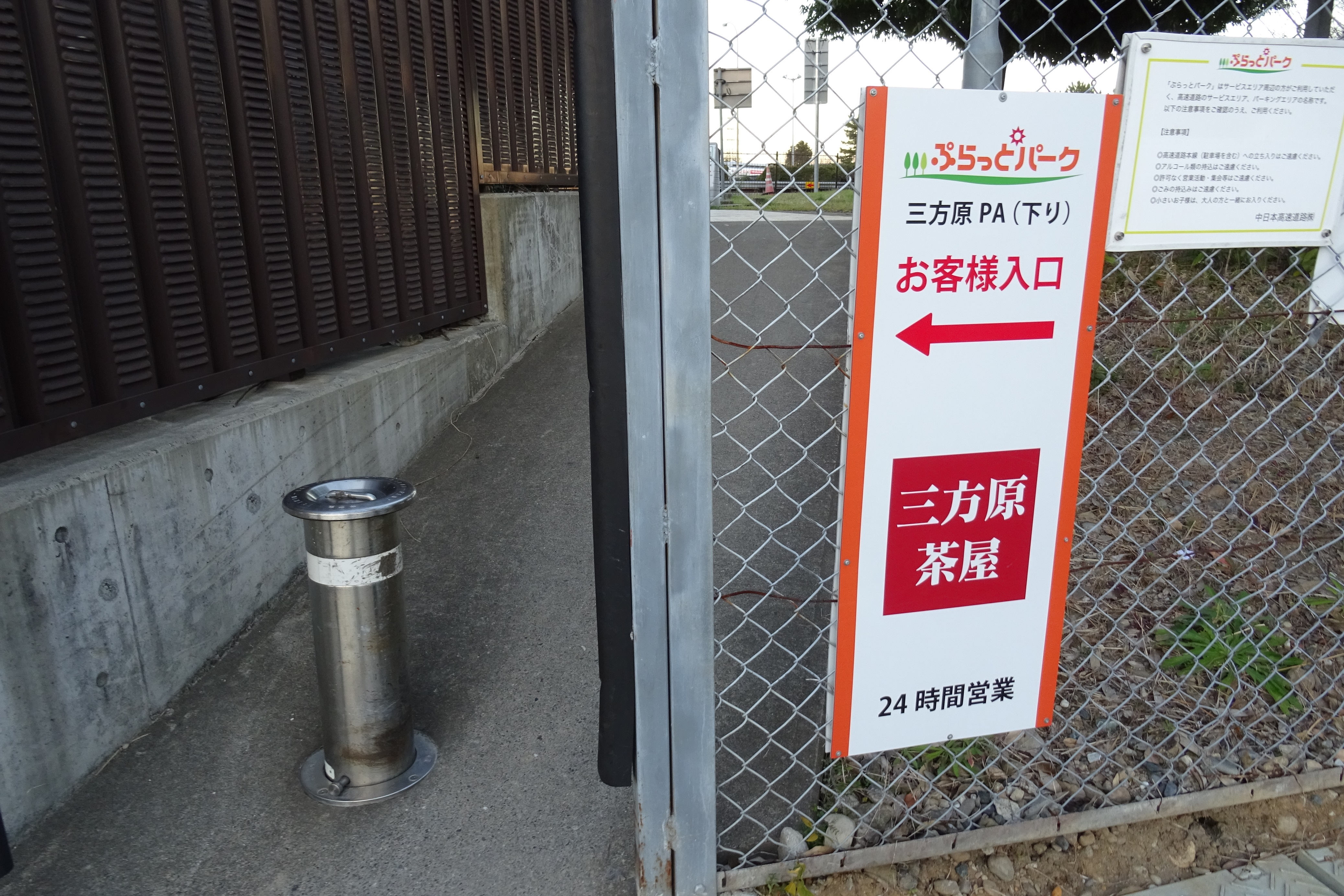 三方原ぷらっとパーク